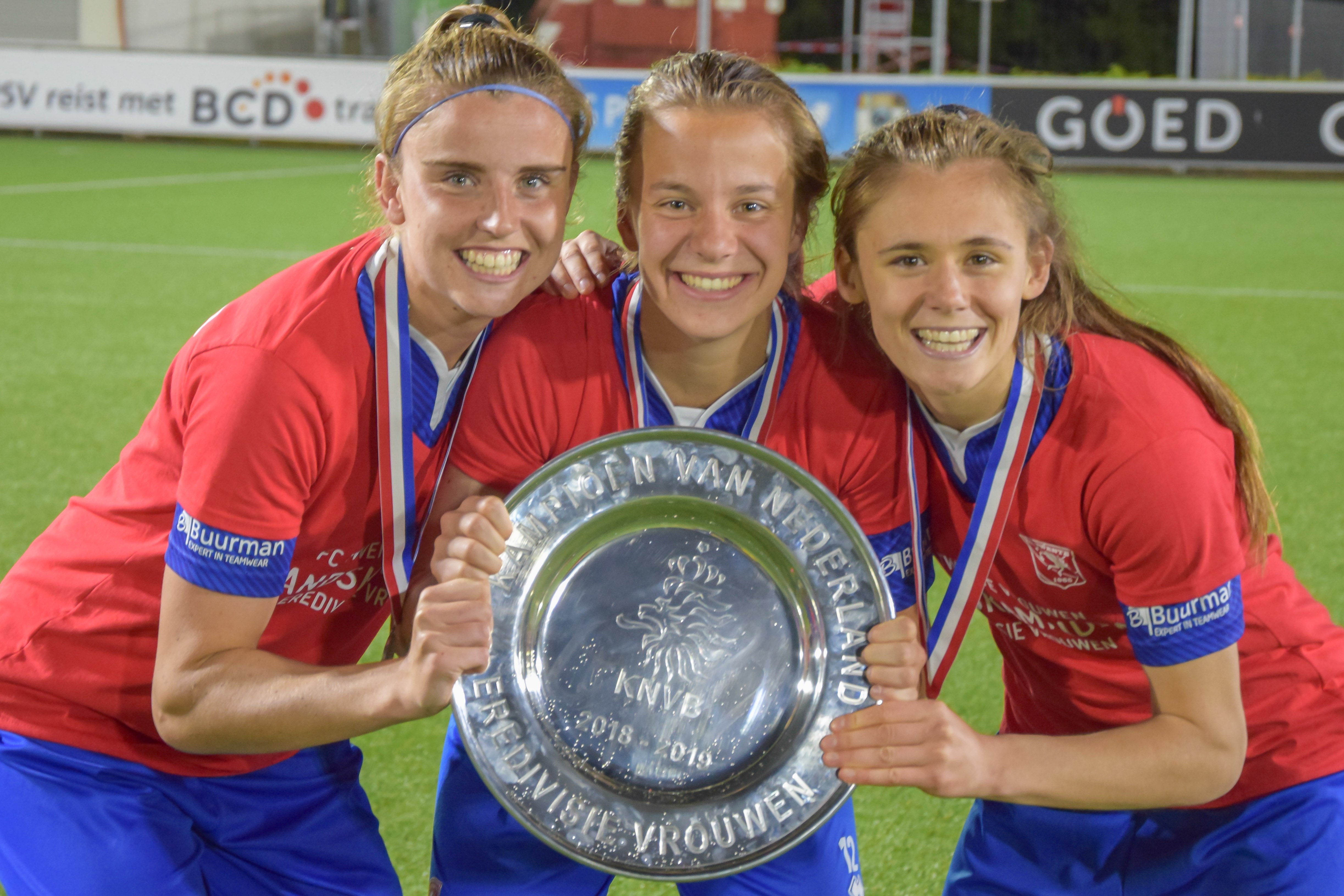 Prijsuitreiking na overwinning landskampioenschap FC Twente. Van links naar rechts staan: Myrthe Morrees, Lynn Wilms en Joelle Smits